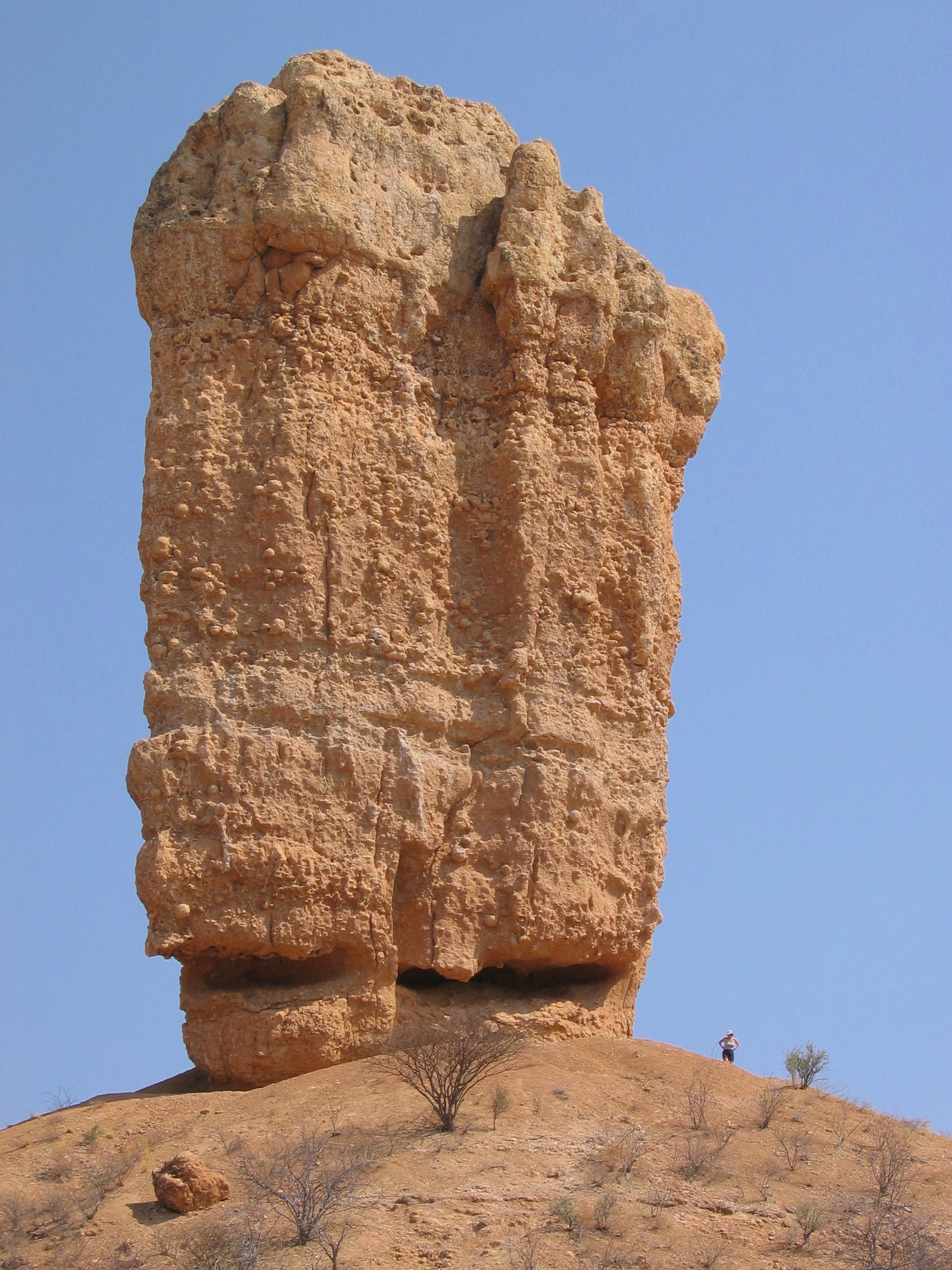 Fingerklippe, Namibia, Blick von Südosten